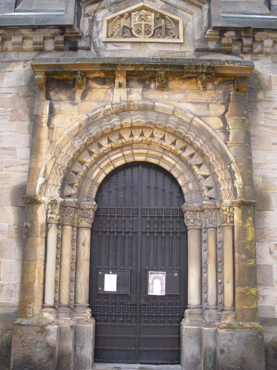 Ciaño (Langreo) - Iglesia de San Esteban